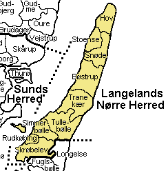 Langelands Nørre Herred Svendborg Amt, Denmark. Map by Svend-Erik Christiansen, edited by user:Nico-dk .